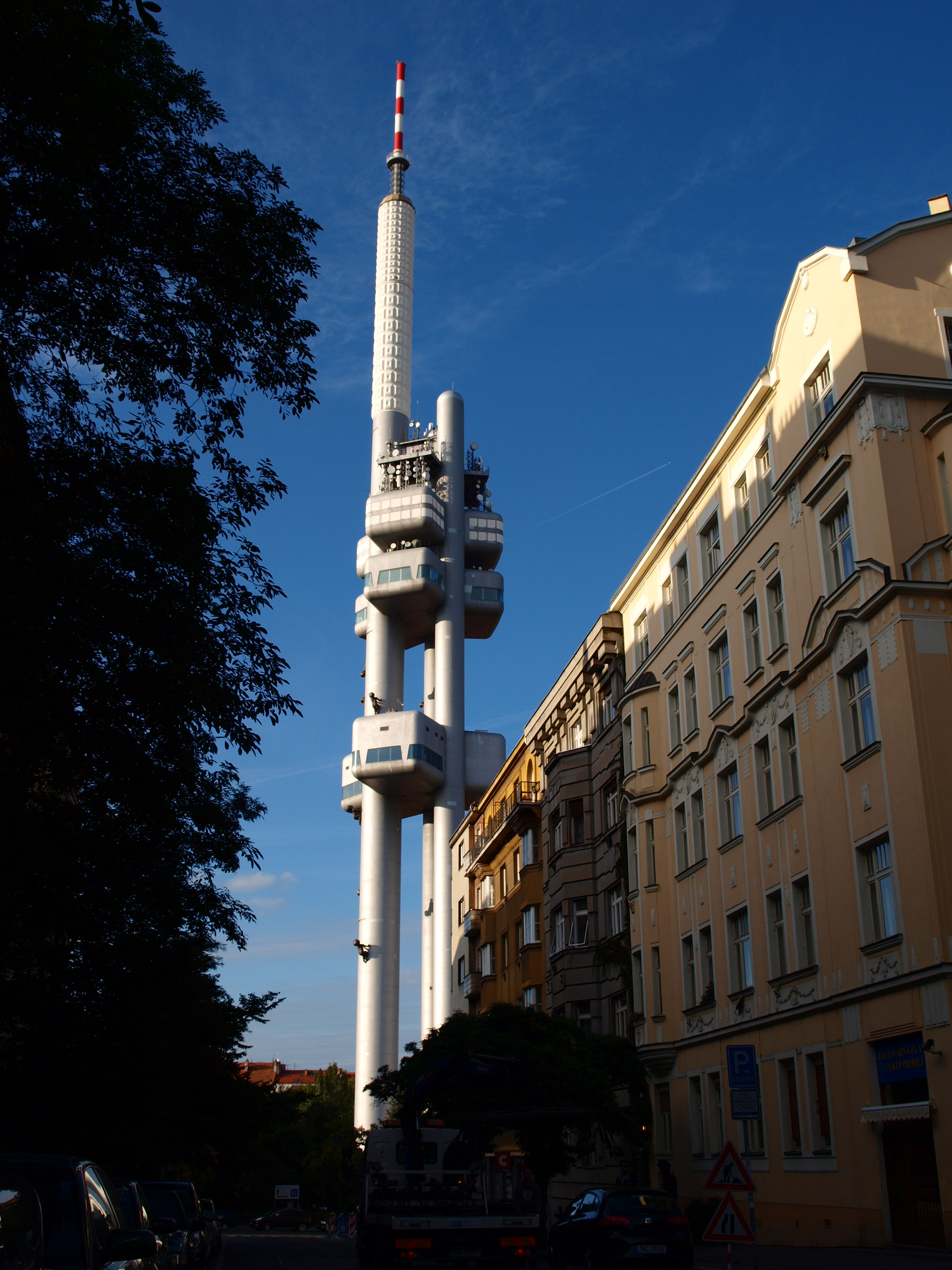 Žižkovská věž